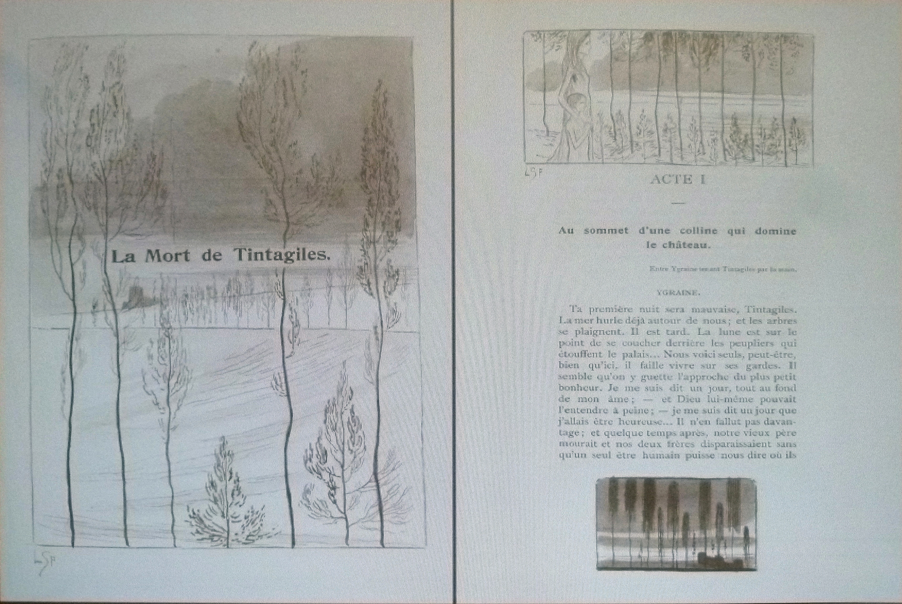 "La Mort de Tintagiles" - Théâtre (Maeterlinck); links: "Titelblad"; rechts: "De omgeving van het kasteel"; illustraties door Léon Spilliaert (1903); privébezit